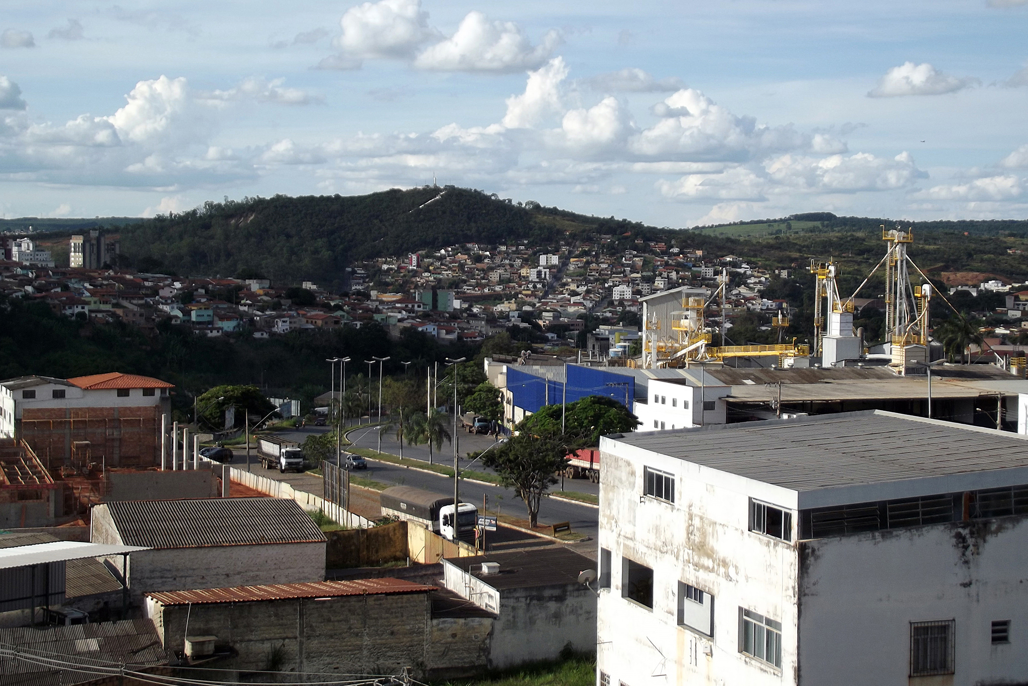 Avenida Ovídio de Abreu, localizada em Pará de Minas, Minas Gerais.